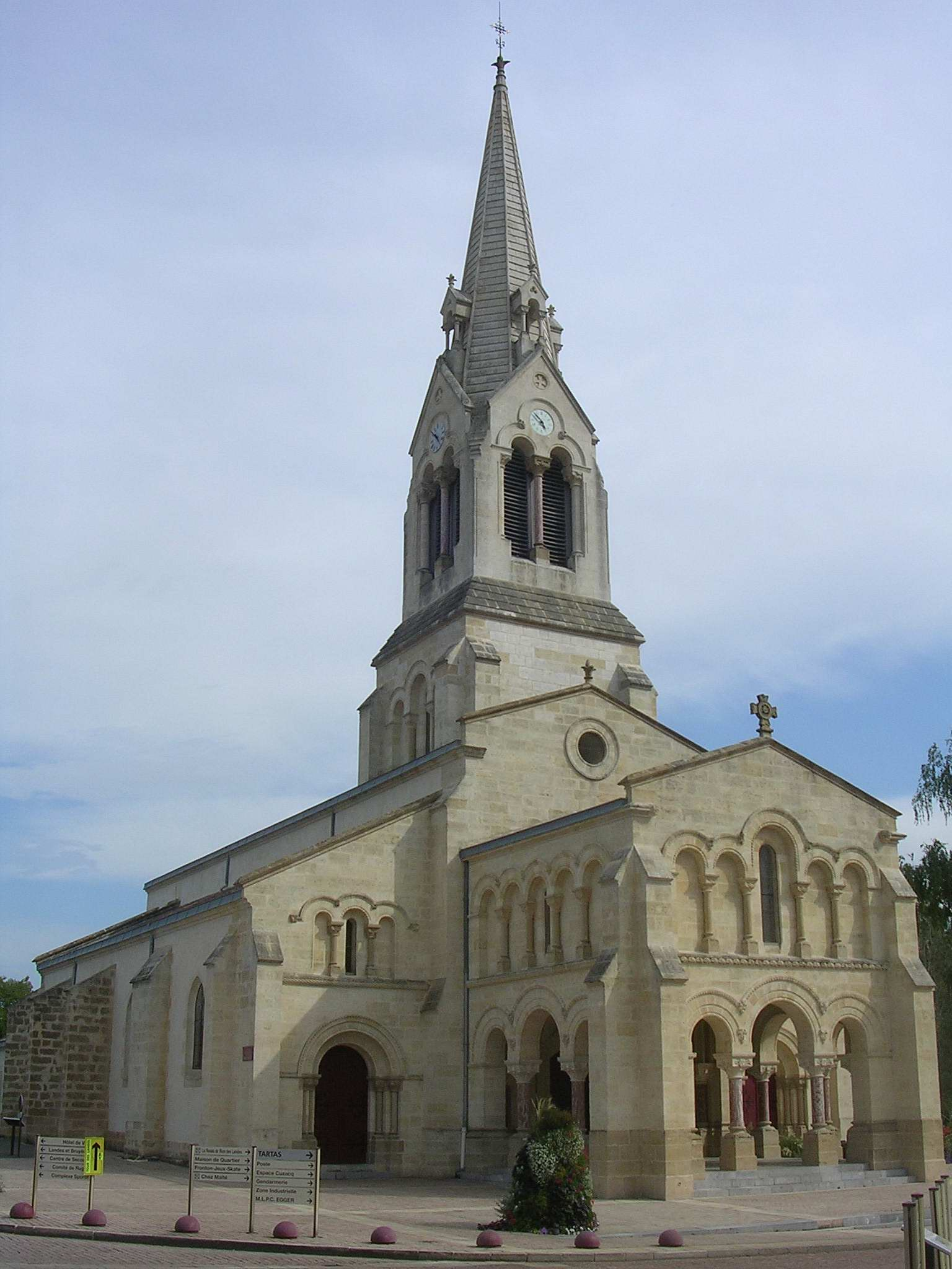 Église Saint-Barthélemy de Rion-des-Landes